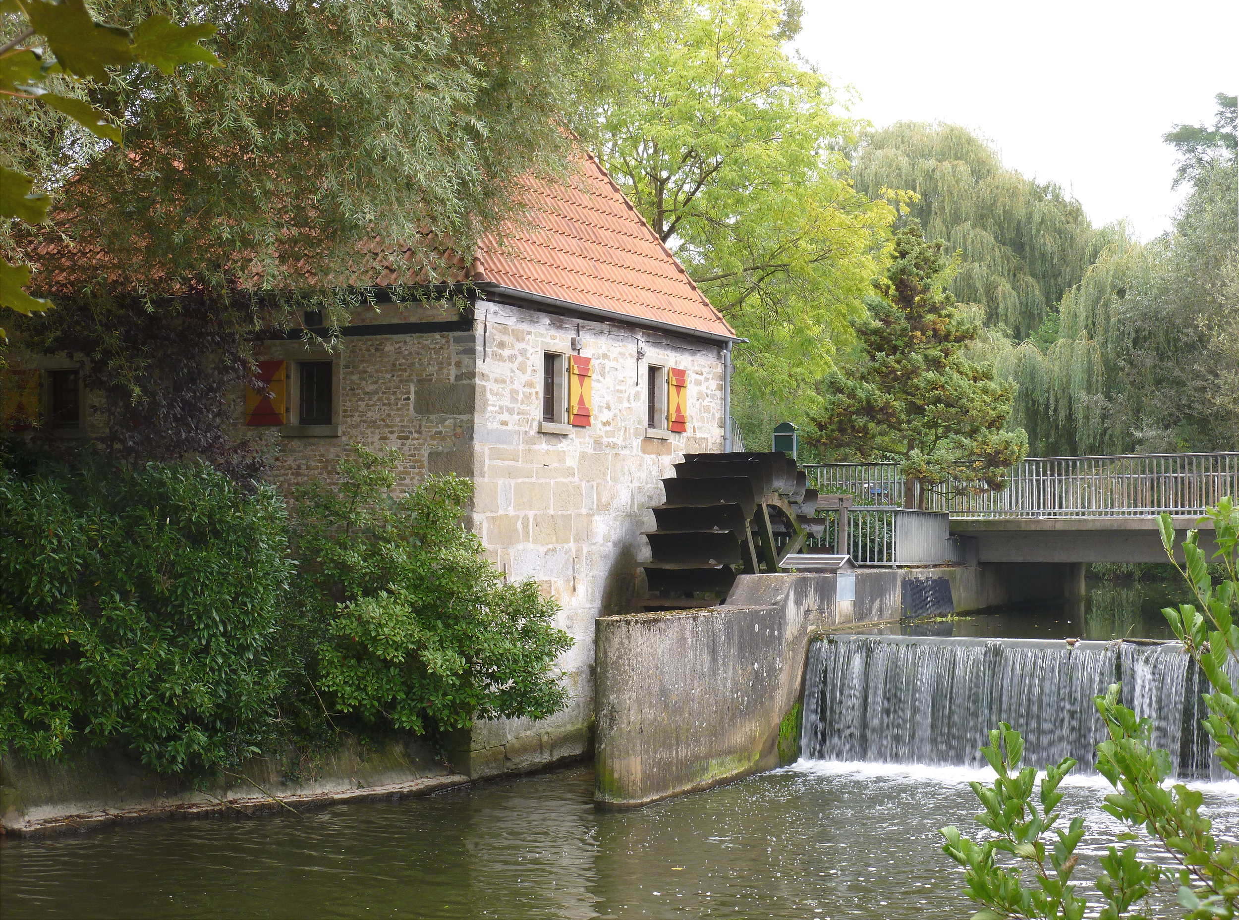 Niedermühle in Steinfurt-Burgsteinfurt This is a photograph of an architectural monument.